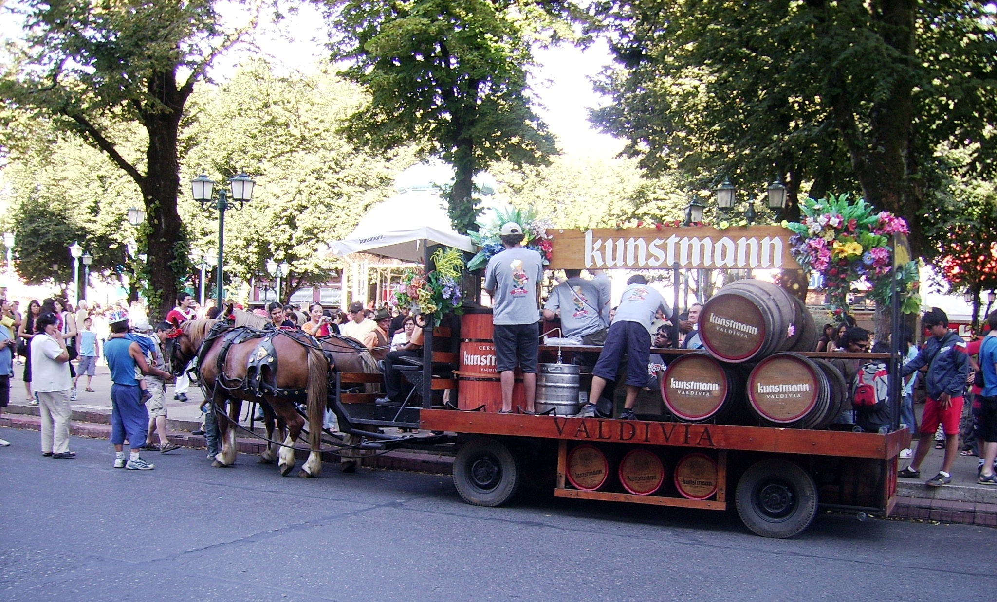 Carro de la cervecería Kunstmann, repartiendo cerveza a los transeúntes durante la Semana Valdiviana 2008.